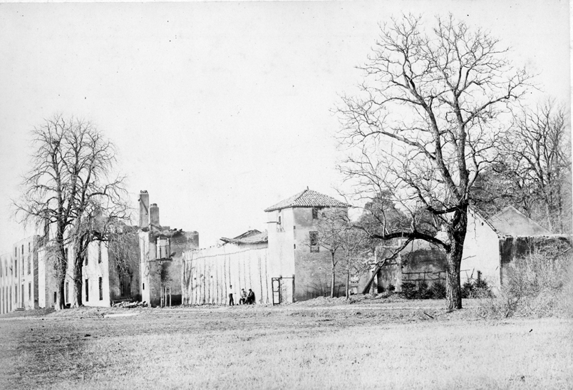 Photographie noir et blanc du château de Colombey, incendié après les batailles de la Guerre de 1870.